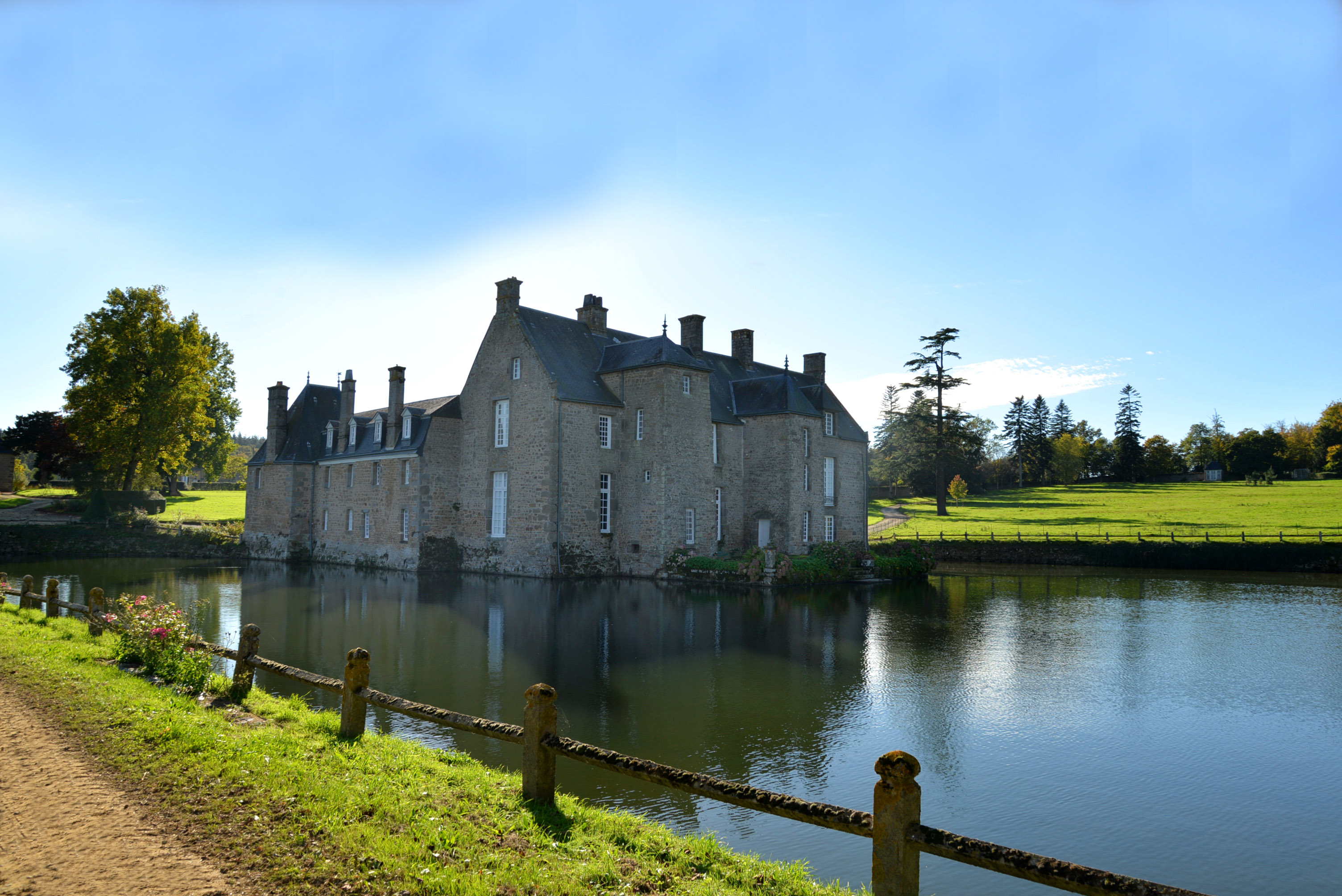 Les Yveteaux (Orne)